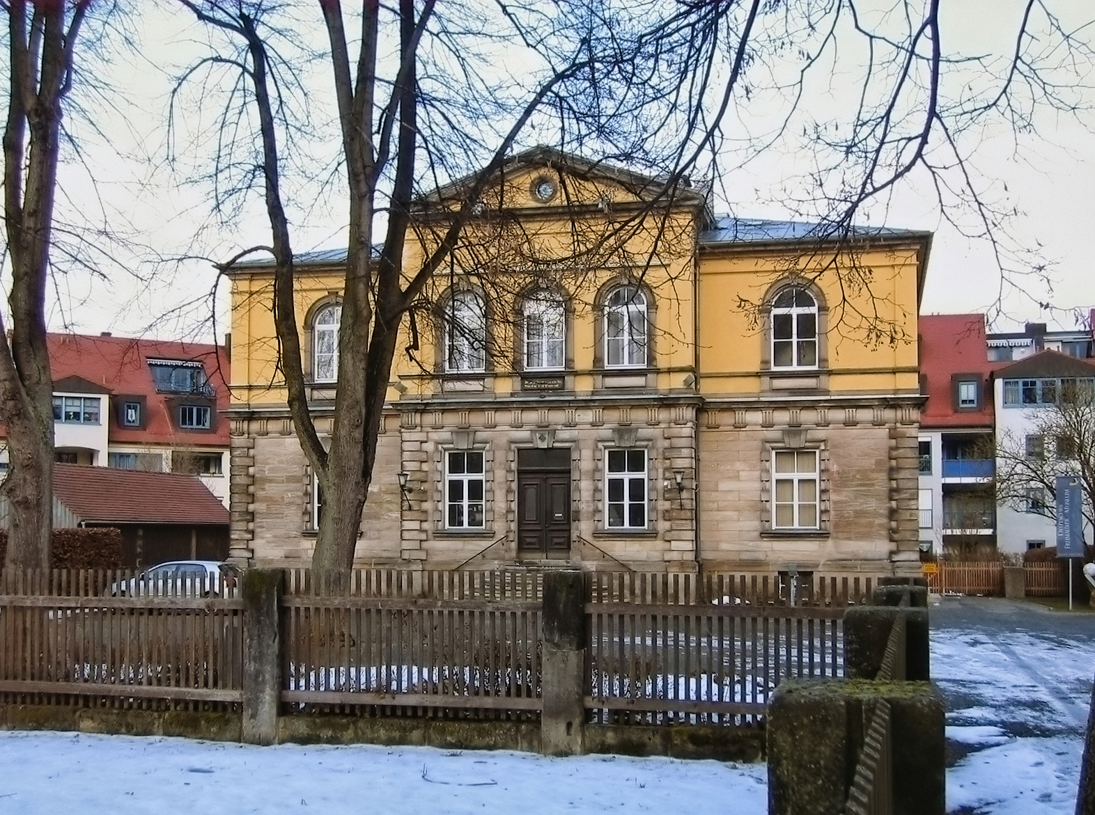 Deutsches Freimaurer-Museum am Hofgarten in Bayreuth